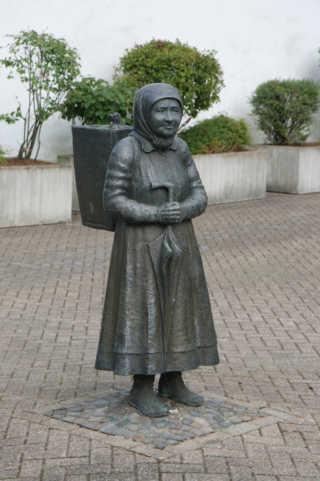 Bronzefigur "Kiepenlisettken" des Bildhauers Waldemar Wien auf dem Rathausplatz in Schalksmühle.